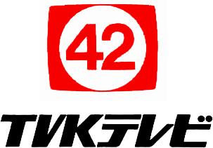 TVKテレビのロゴ